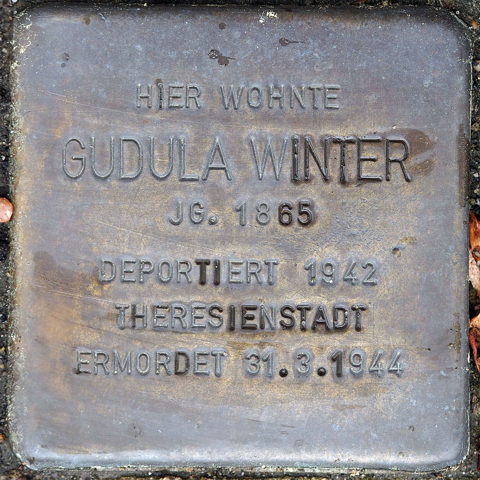 Stolpersteine Korschenbroich: Winter, Gundula